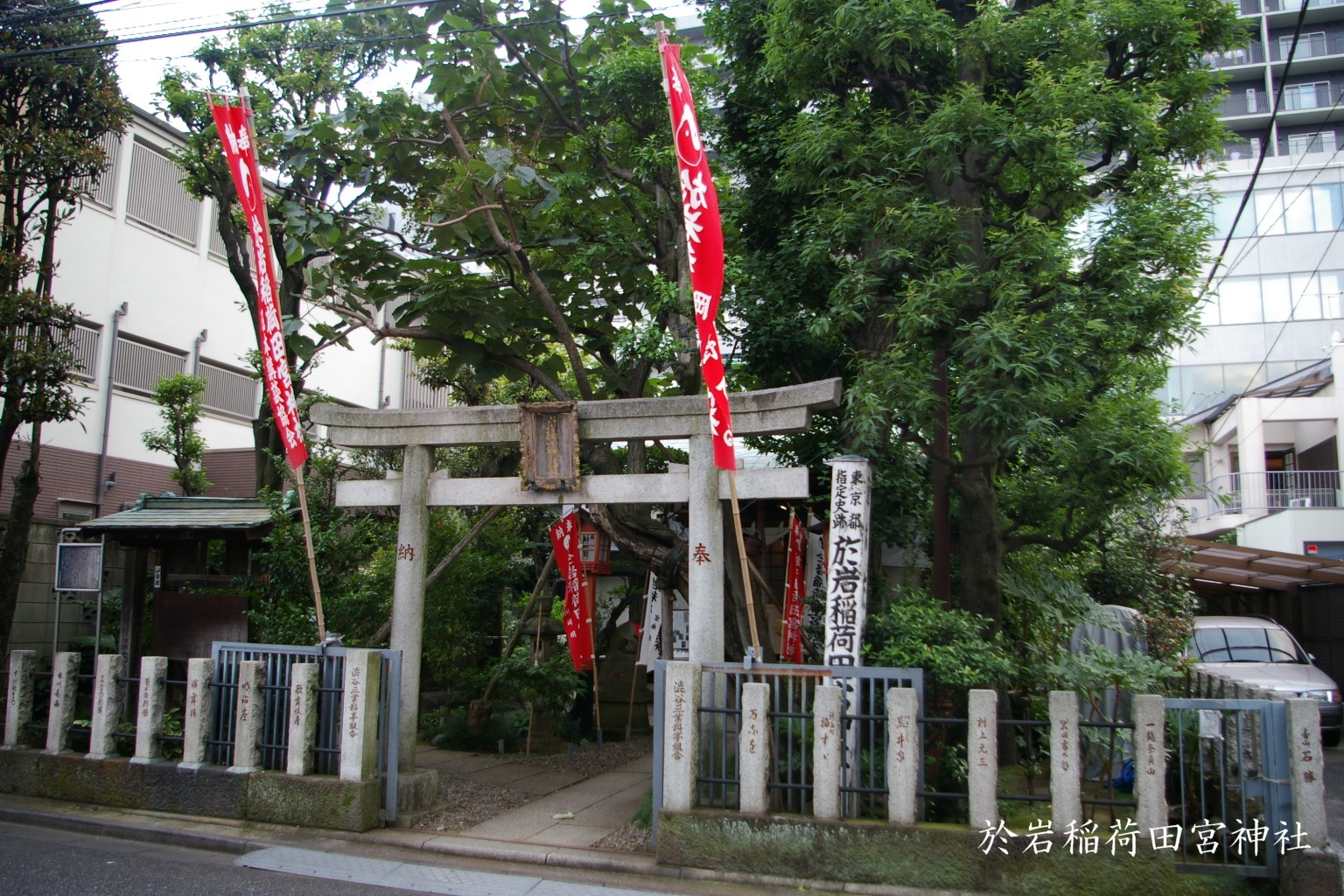 2009年都内で上野彦馬 (talk)が撮影しました。